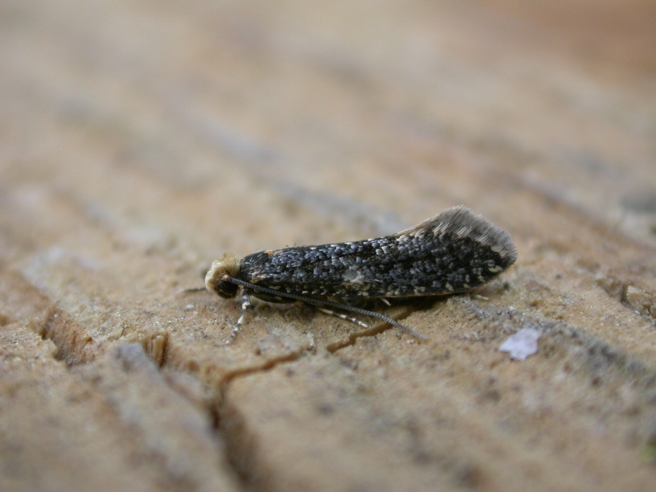 Tinea laevigella, to MV light, Hellerup, Denmark, 31 May 2003